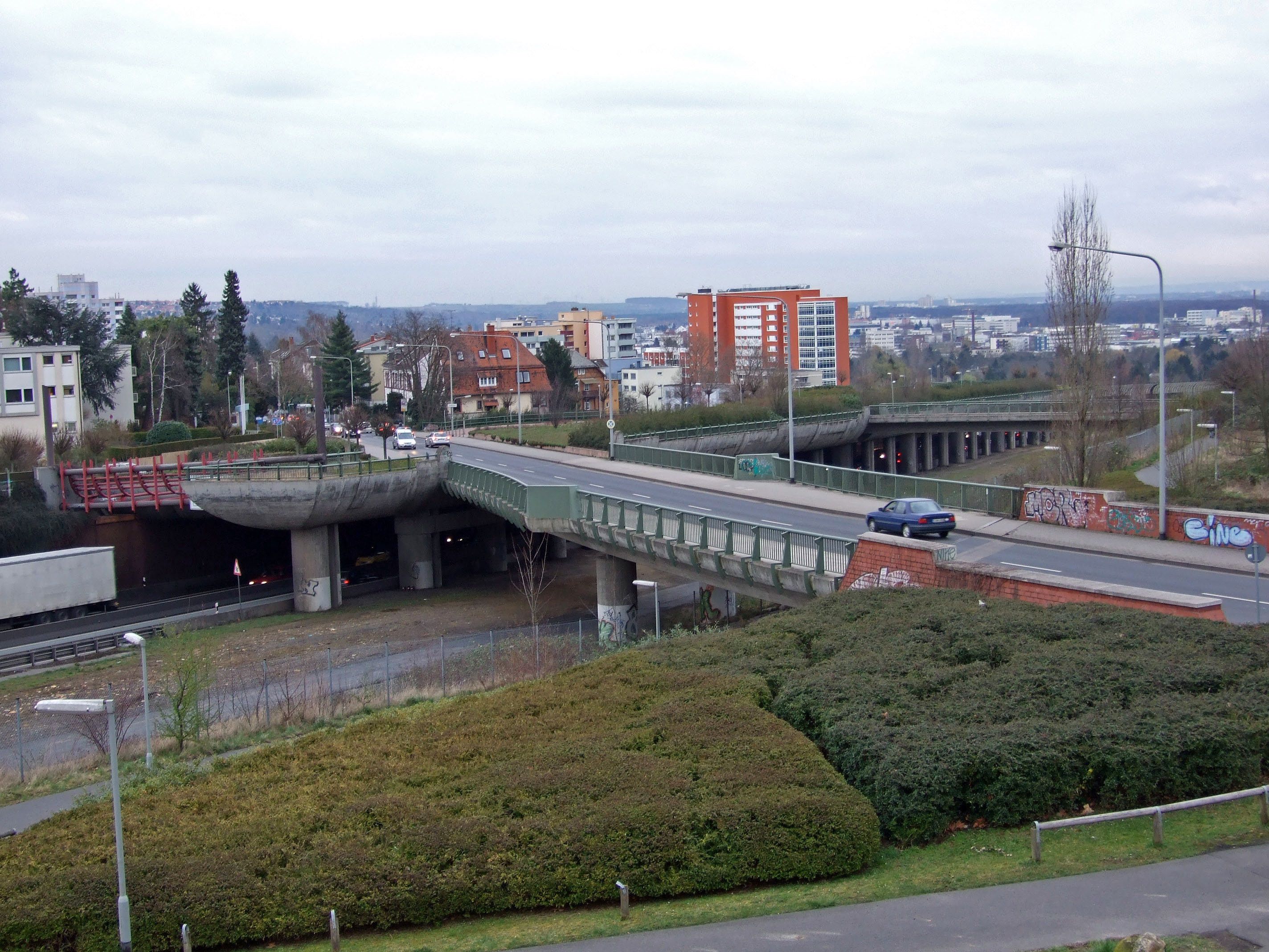 Die „Einhausung“ der „A 661“ an der Unterquerung der „Seckbacher Landstrasse“, an der Stadtteilgrenze Bornheim-Seckbach, Blick-Richtung Sued-Ost (Seckbach), von der Bornheimer Seite